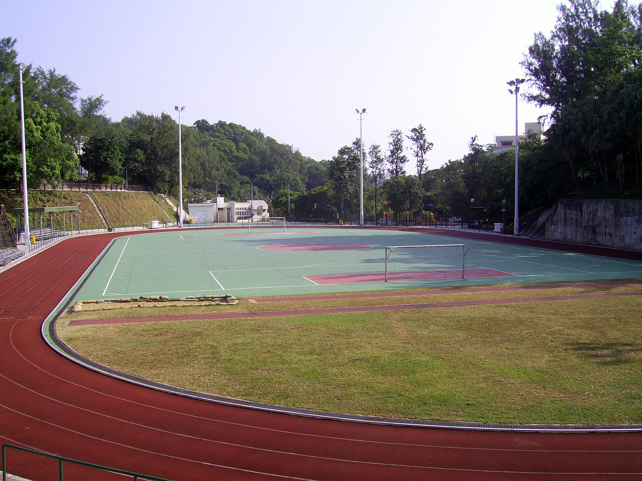 中文（香港）: 長洲運動場